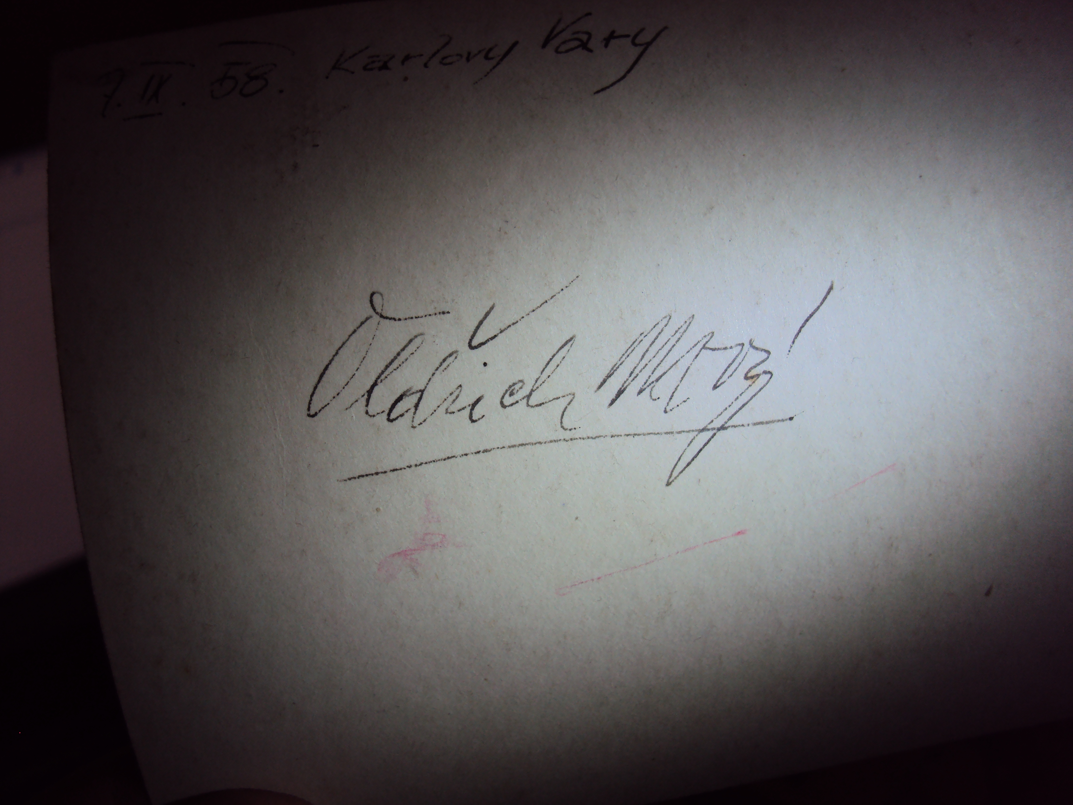 Podpis herce Oldřicha Nového ze dne 7. 9. 1958 v Karlových Varech